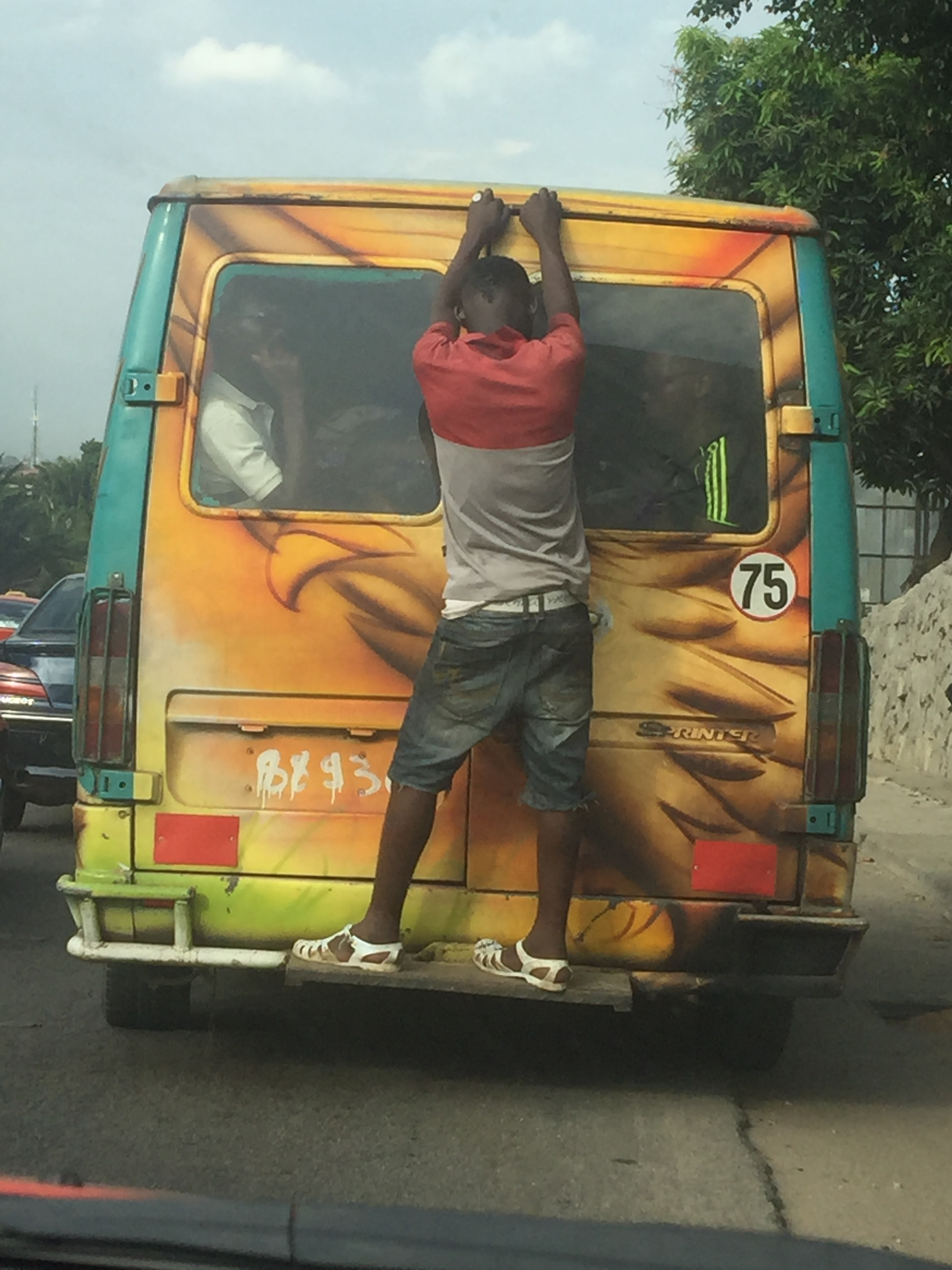 Un apprenti Gbaka (transport en commun ) à Abidjan This is an image of "African people at work" from Ivory Coast